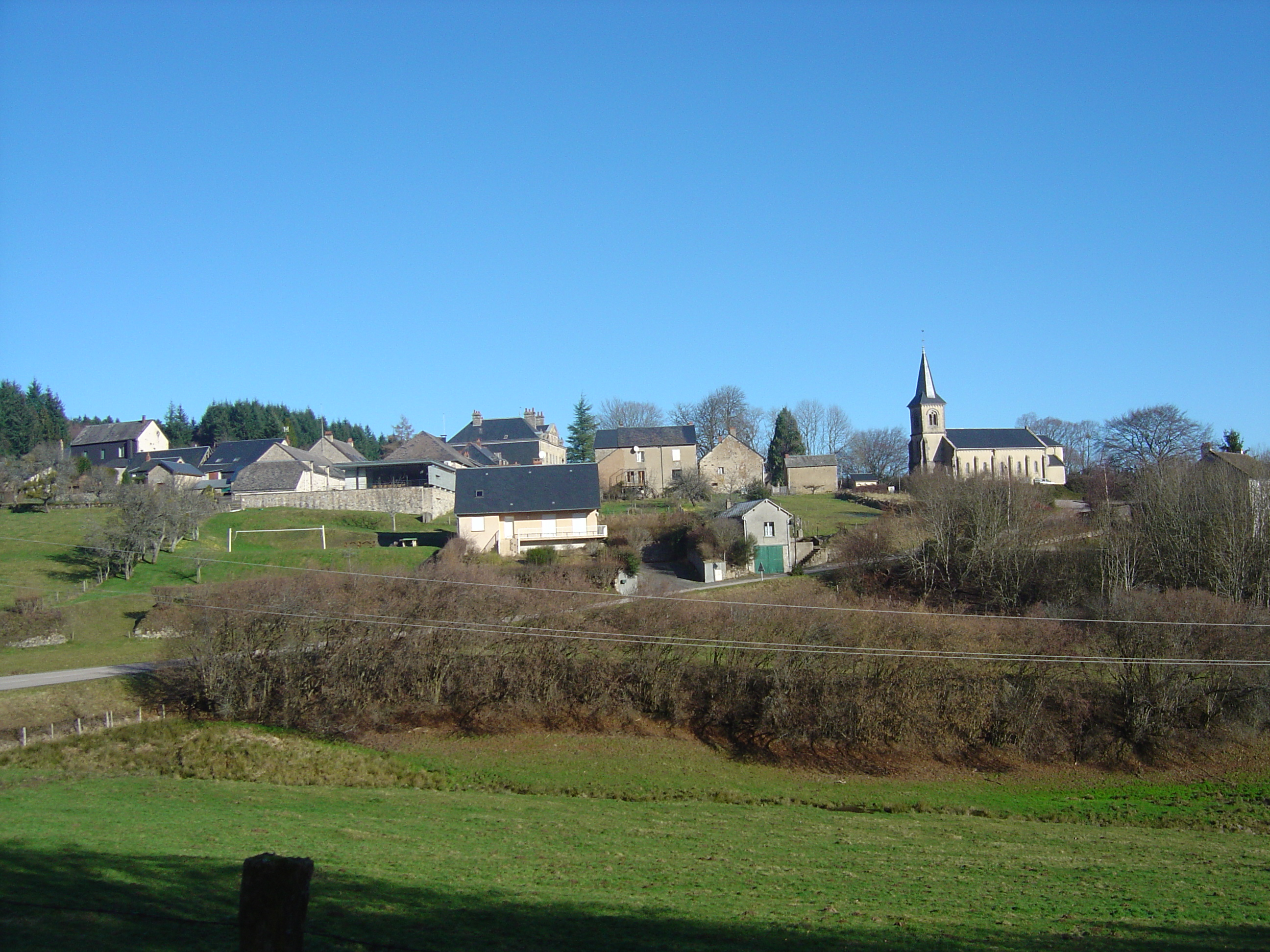 Vue générale de Glux-en-Glenne